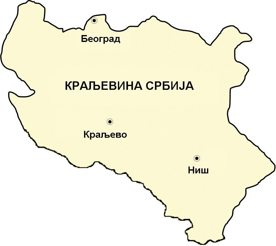 Границе Краљевине Србије 1882–1912. Исте границе је имала и Кнежевина Србија 1878-1882.